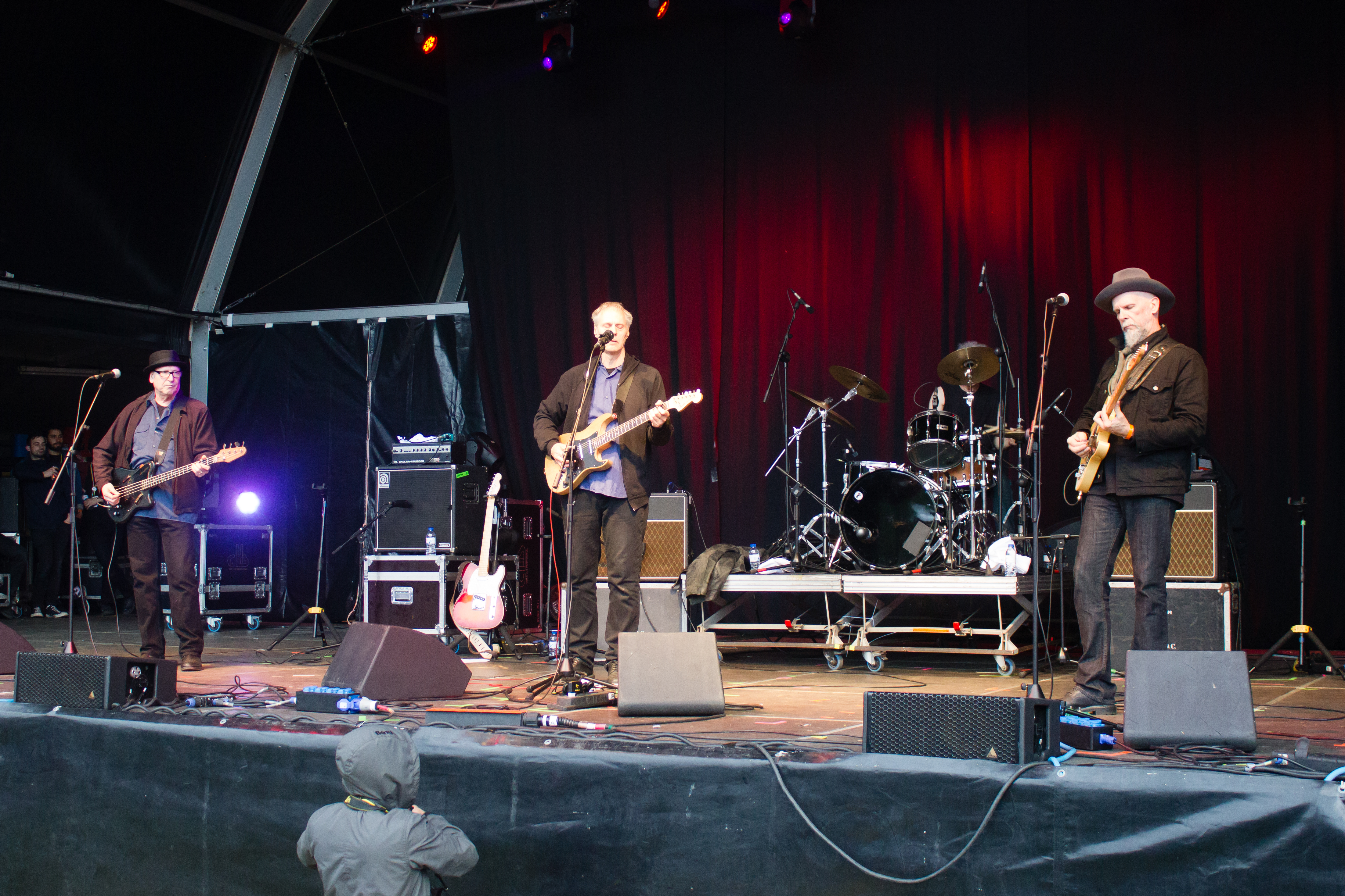 A banda estadounidense Television no NOS Primavera Sound 2014 de Porto.